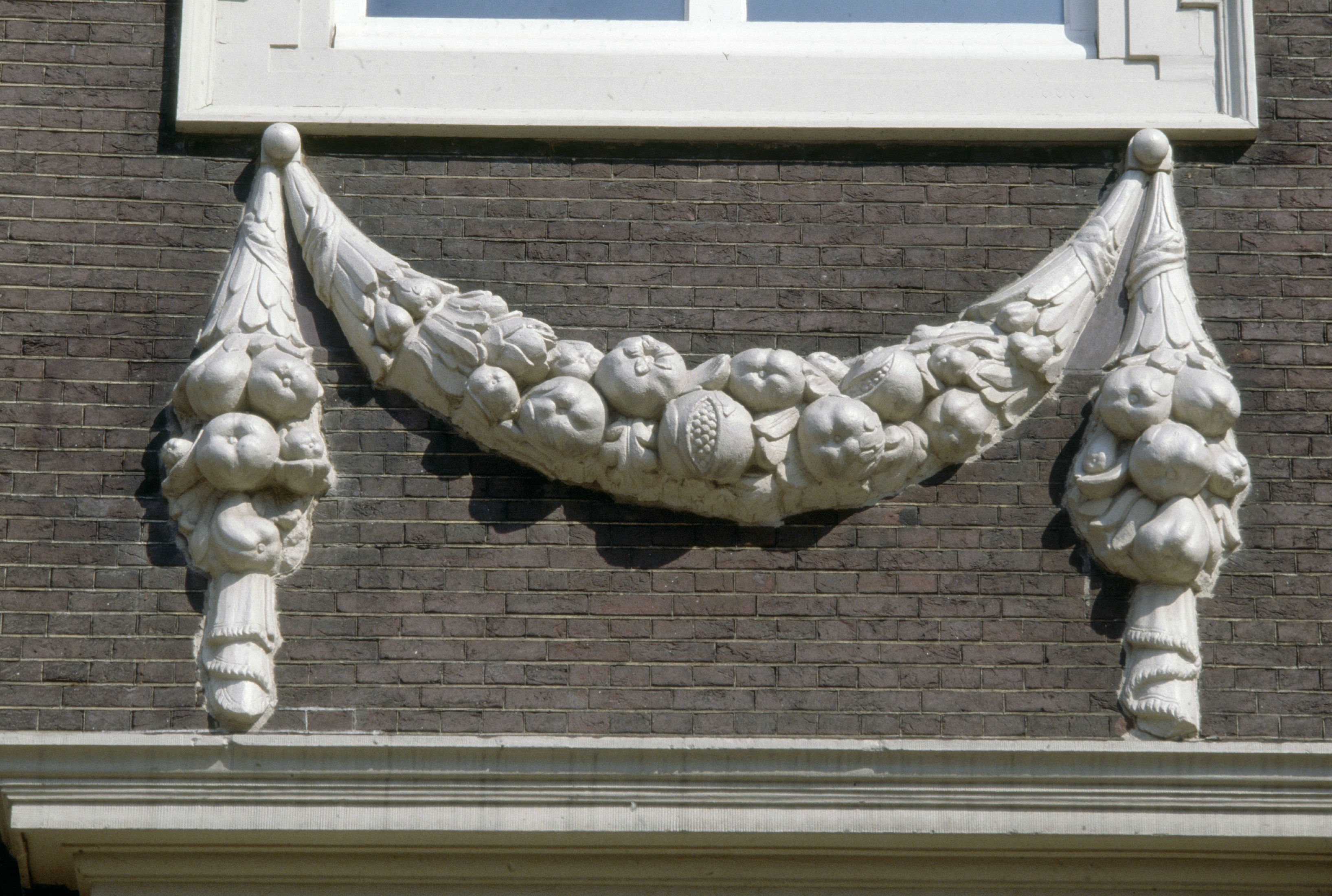 MAURITSHUIS: Exterieur VOORGEVEL, FESTOEN